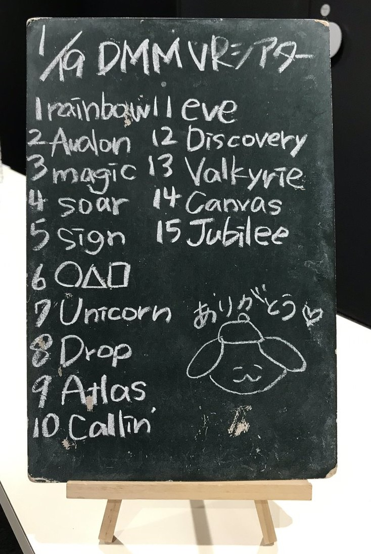 amiinAセトリボード